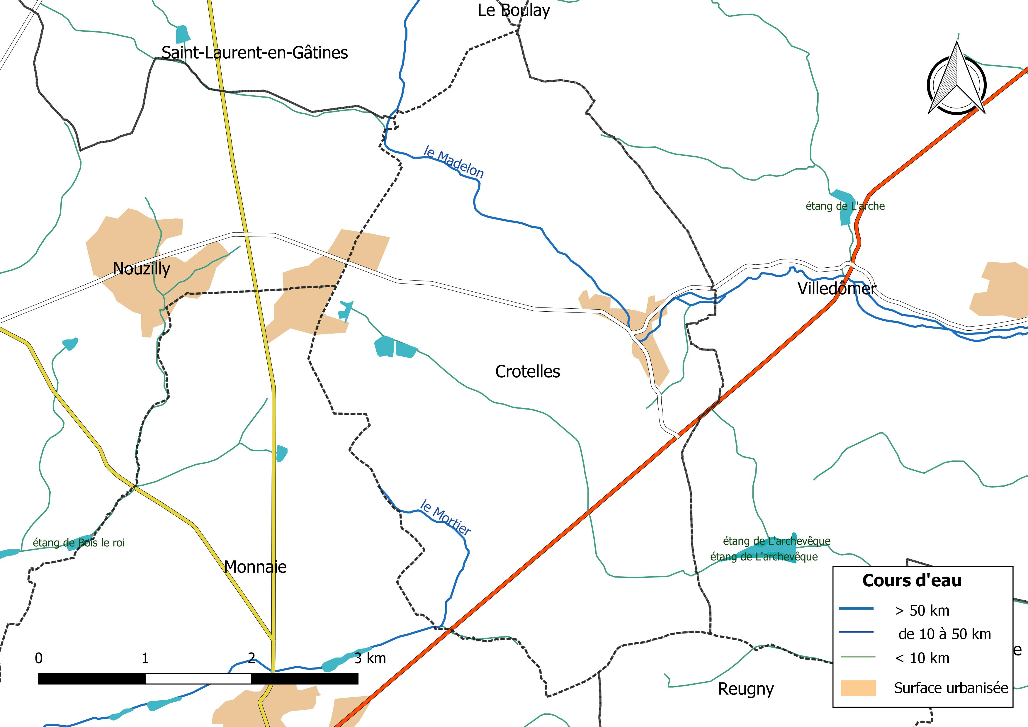 Carte du réseau hydrographique de la commune de Crotelles (France).